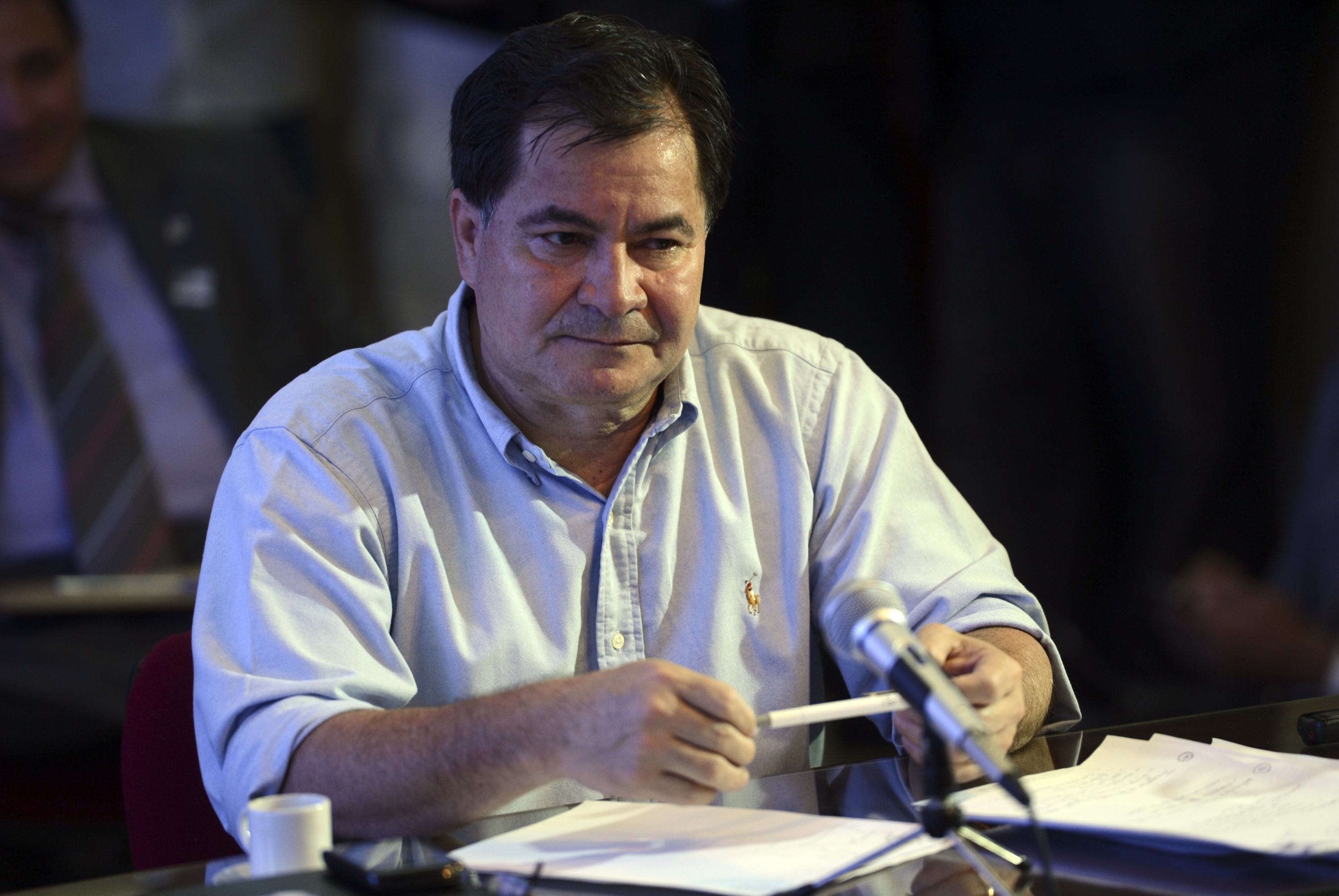 Brasília – O senador boliviano Roger Pinto Molina presta depoimento na 4ª Vara de Justiça. Foto: Fabio Rodrigues Pozzebom/ABr